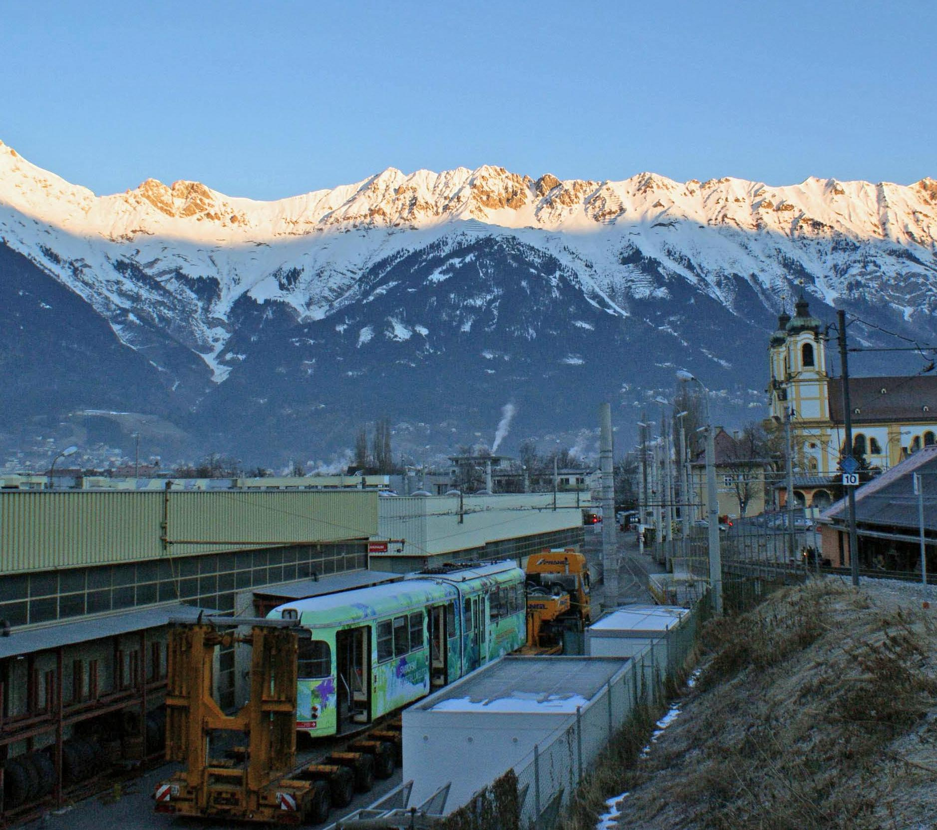 Triebwagen 71 zum bereit zum Abtransport nach Arad am Betriebshof der Innsbrucker Verkehrsbetriebe